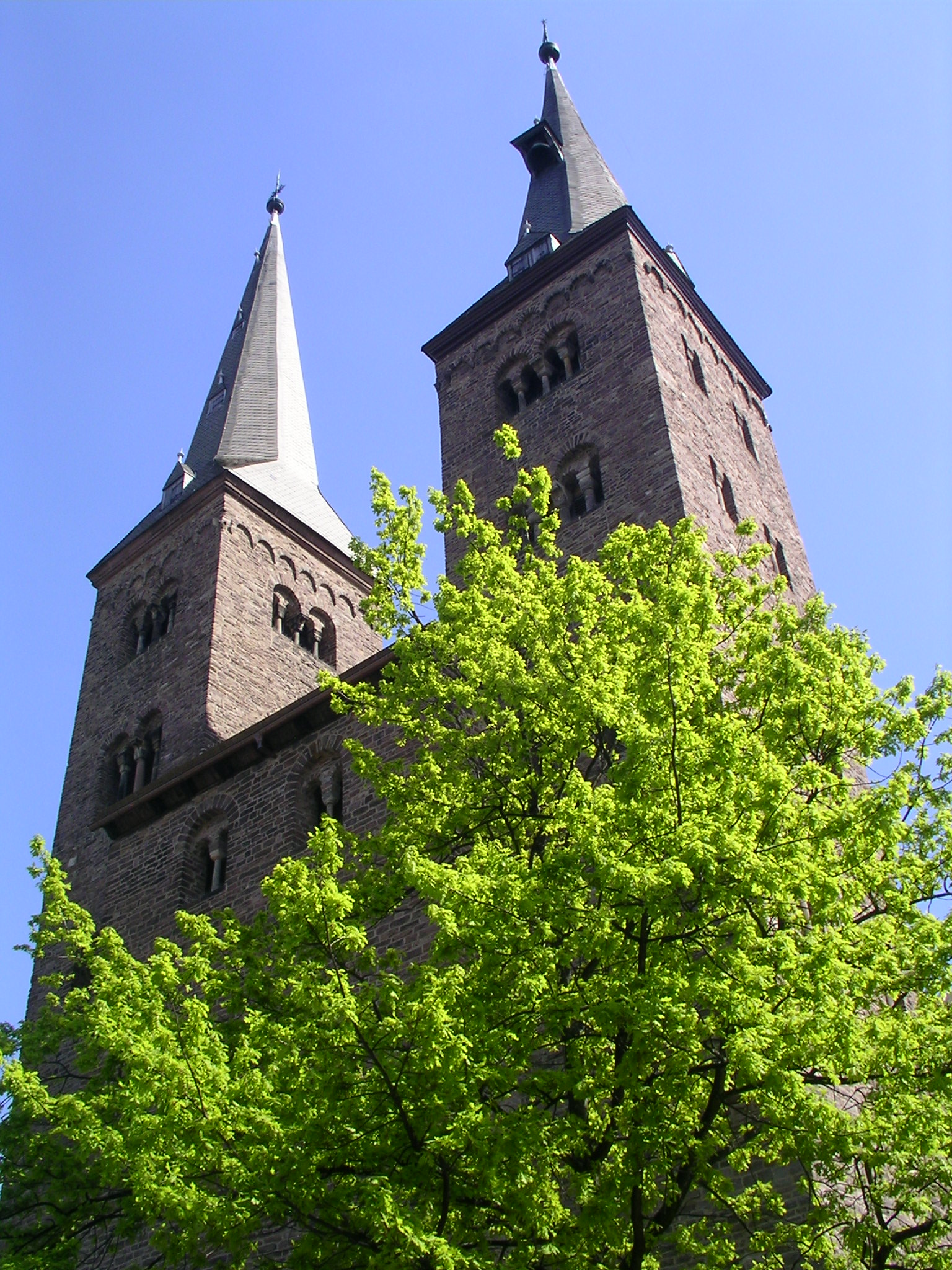 Türme und Westwerk Kilianikirche Höxter